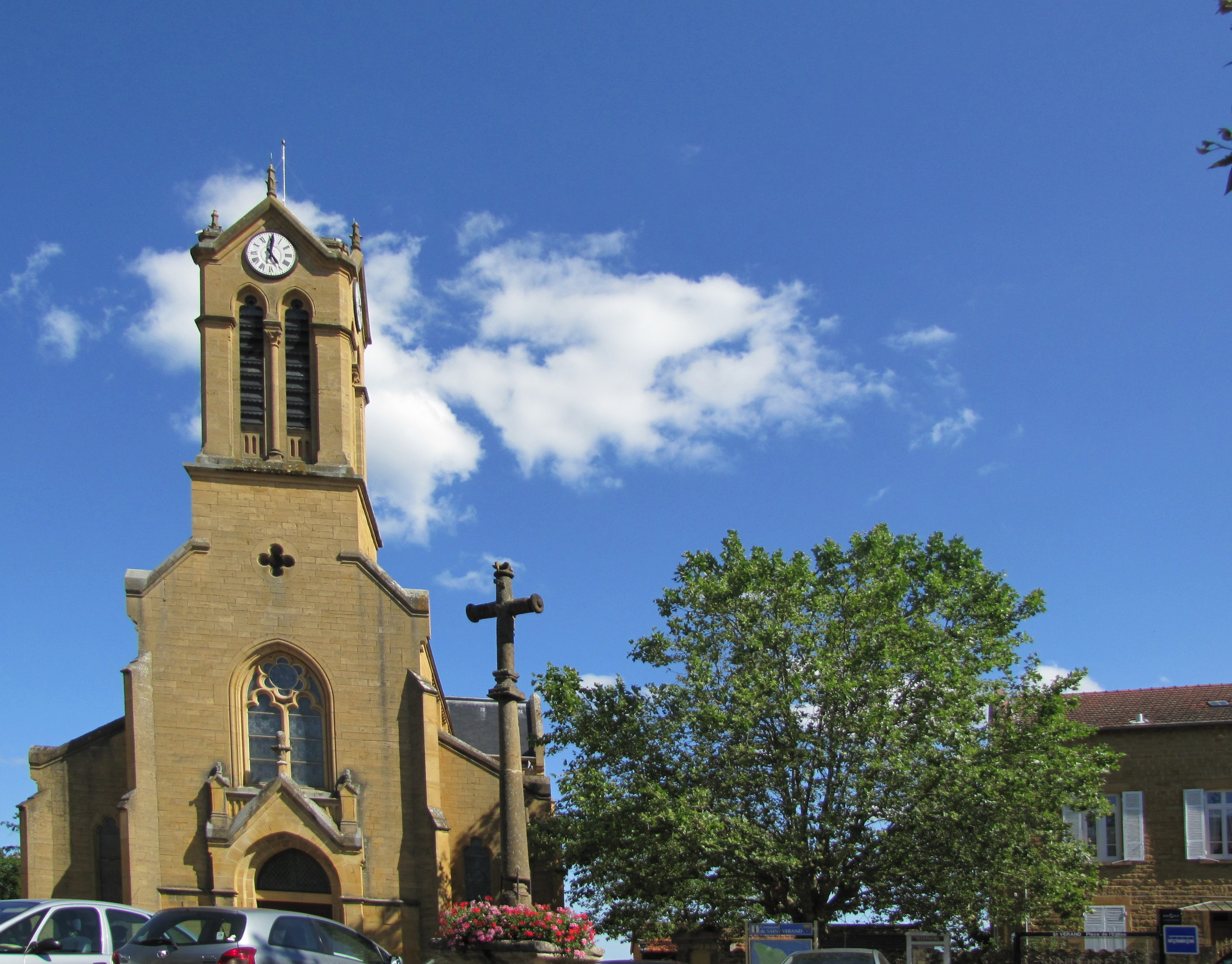 Église de Saint-Vérand, Rhône, France.